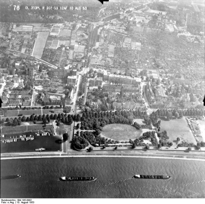 Rheinbefliegung der Alliierten 1953